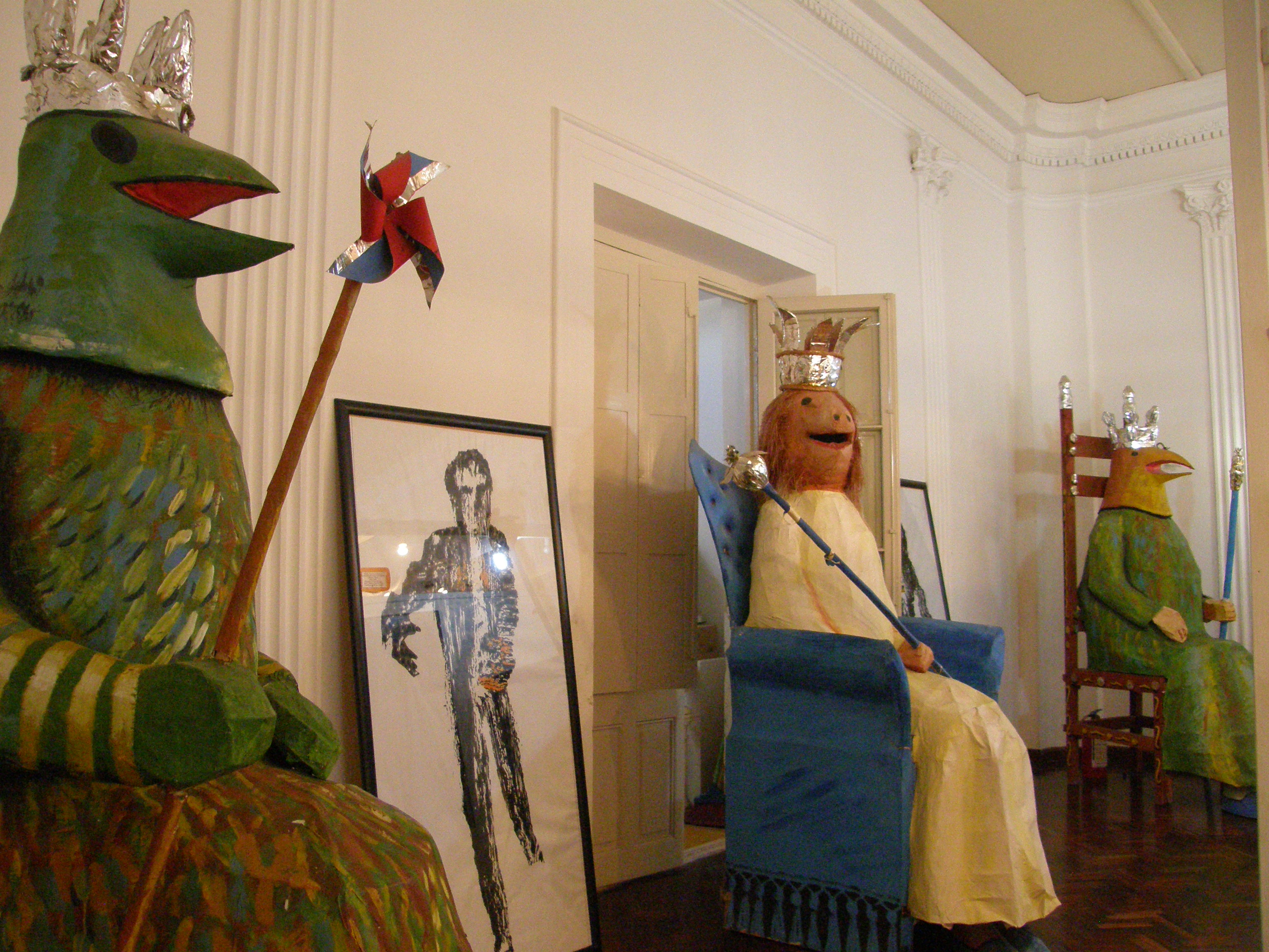 Reproducciones, en gran tamaño de personajes de una obra de Solari, creados para el carnaval en Fray Bentos, a fines de la década del 90..